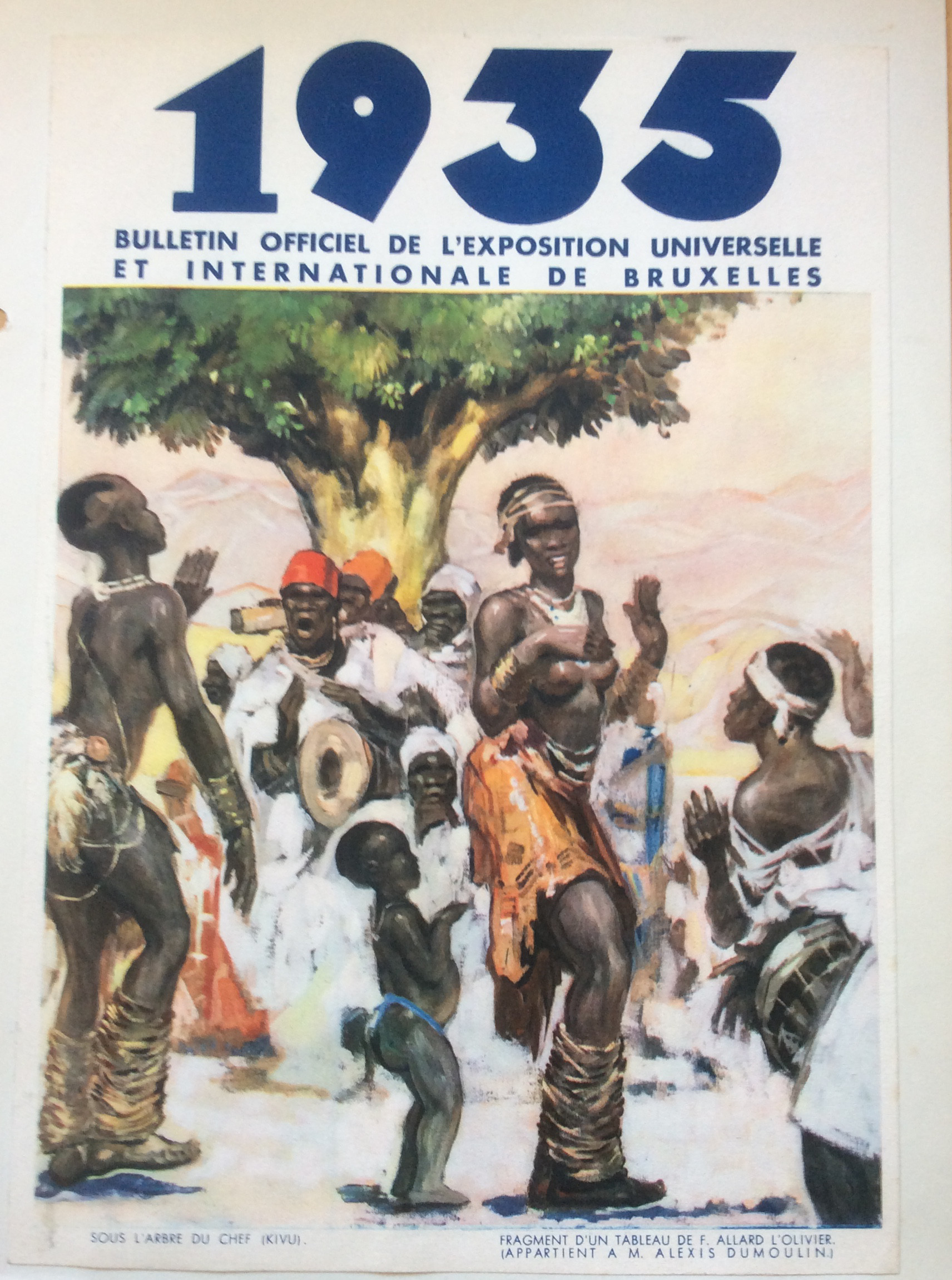 Couverture du bulletin officiel de l'exposition universelle et internationale de Bruxelles, fragment d'une toile de Fernand Allard l'Olivier